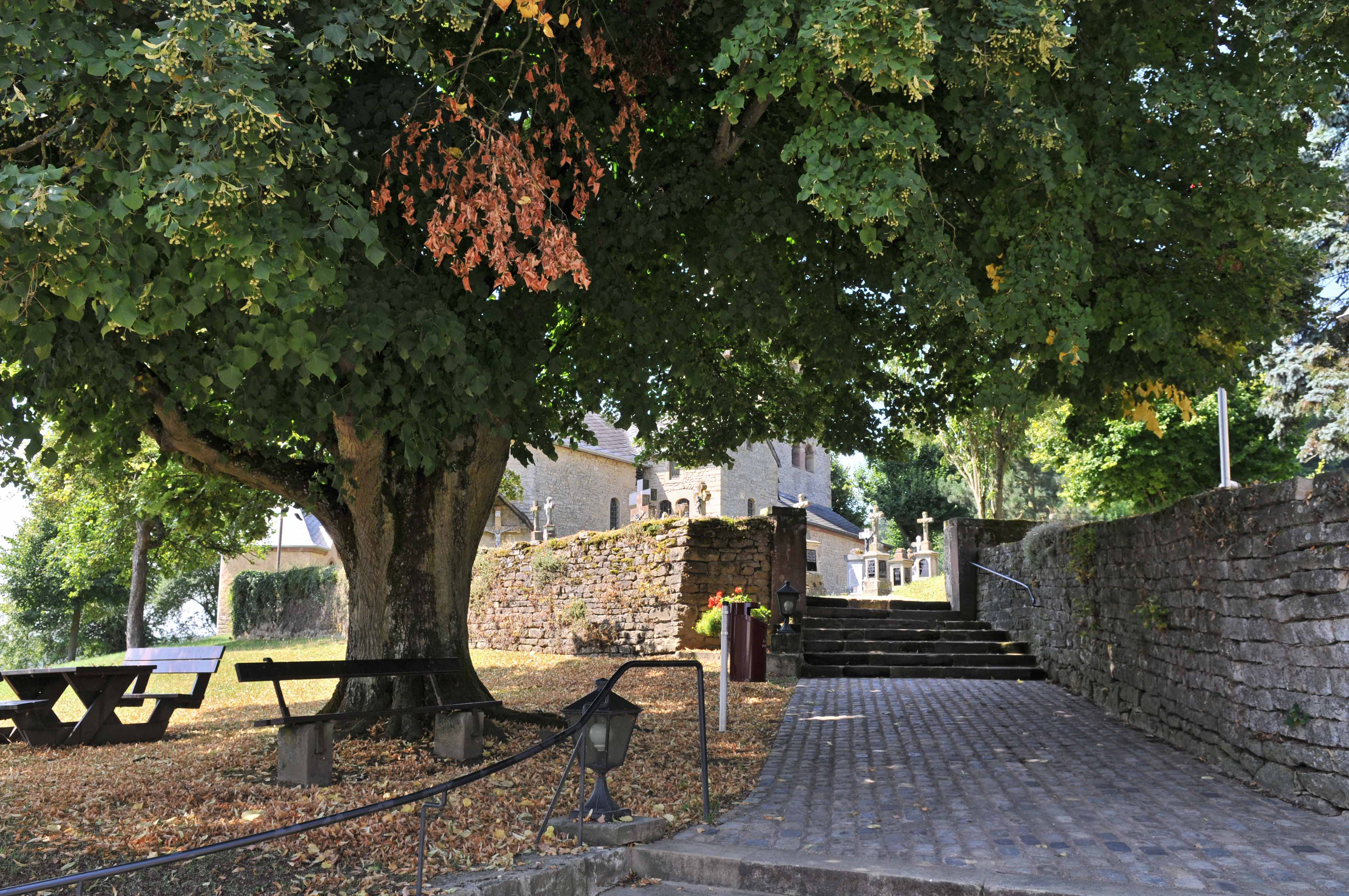 Bemierkenswäert Lann op der Giischterklaus.